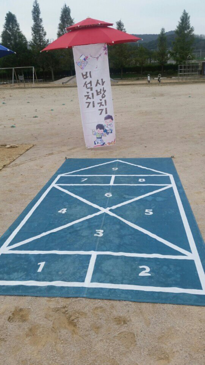 비석치기, 사방치기